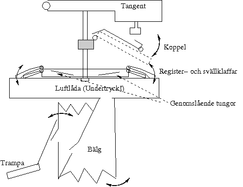 Skiss över mekaniken i en tramporgel (sugluftsharmonium)